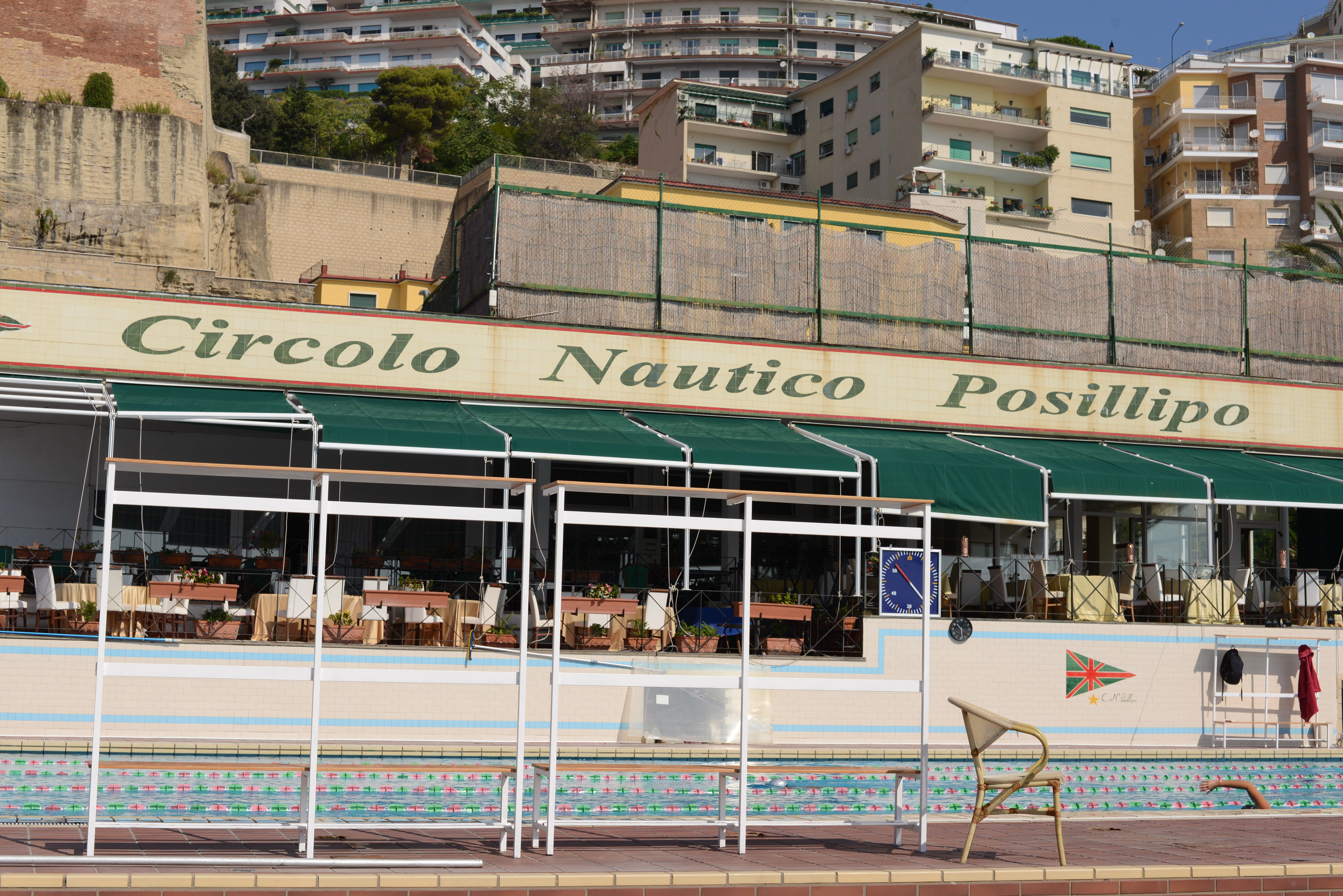 Circolo Nautico Posillipo , la piscina